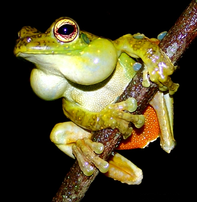 Itapotihyla langsdorffii